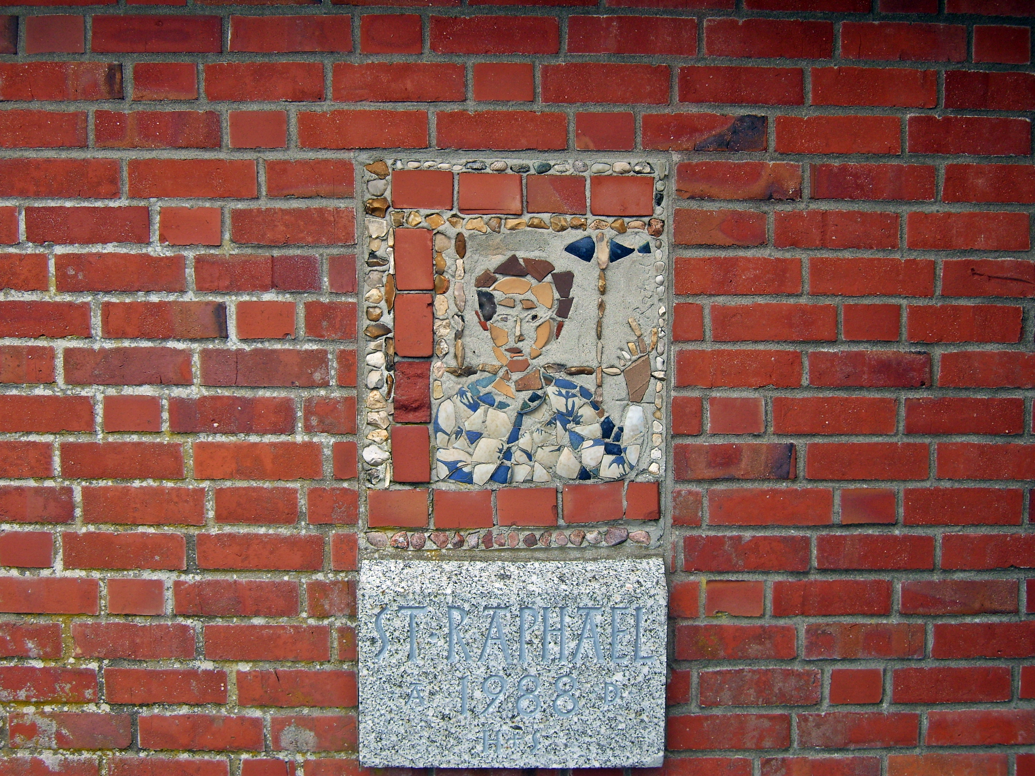 St. Raphael Sylt Wandmosaik